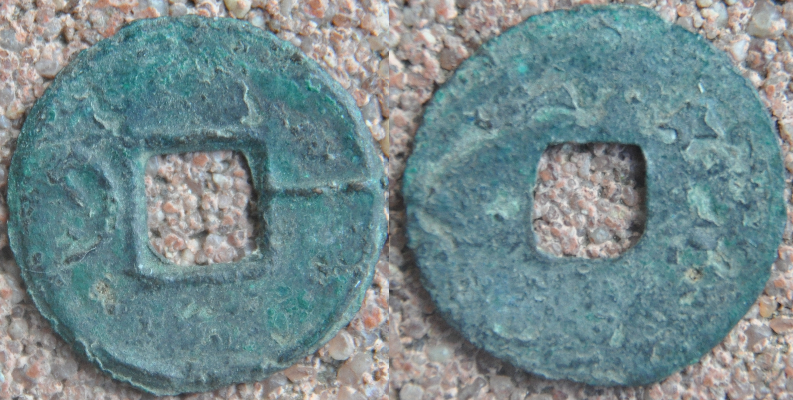 S464 Royaume de Yan monnaie Yi Hua 320-220 BC. Dimension : 20 mm. Poids : 1.4 g. Bronze Chine monnaies Royaume de Yan Monnaies du Royaume de Yan pendant les Royaumes combattants (IVe-IIIe siècles av. J-C)